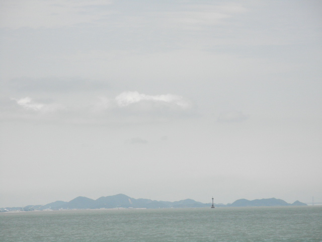 大毛島 遠景